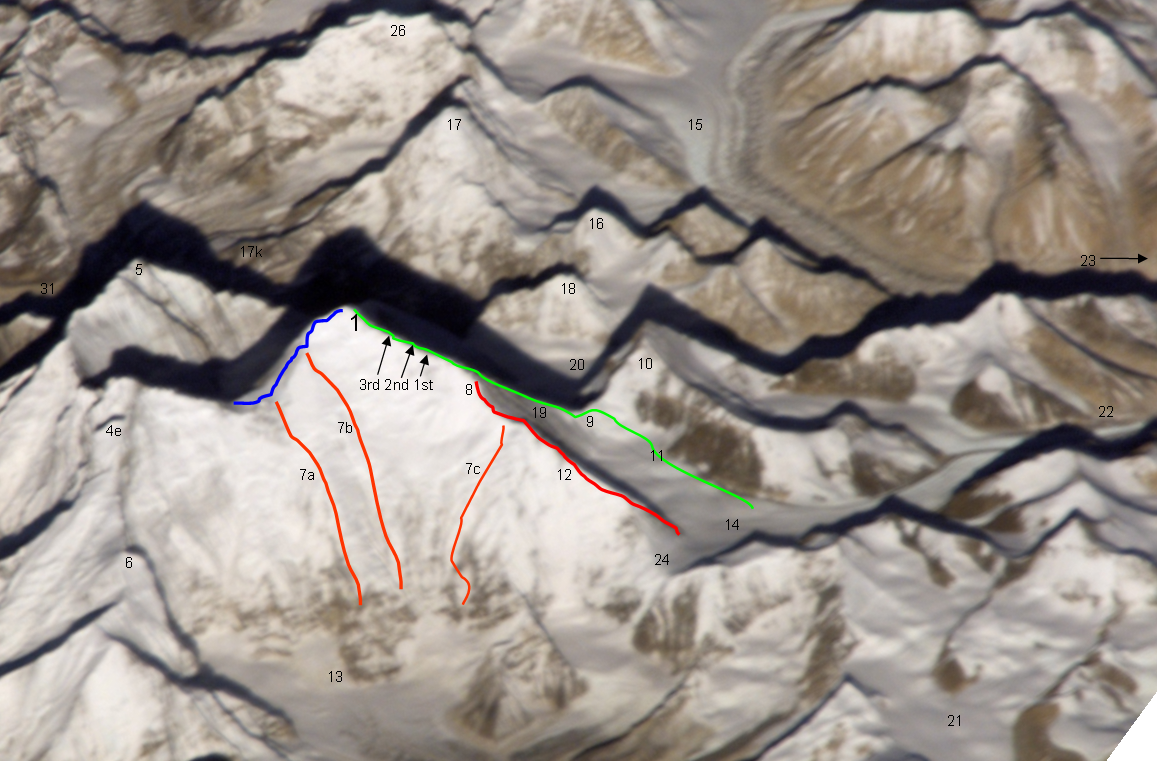 Ost- (Kangshung-) Wand des Mount Everest mit Umgebung